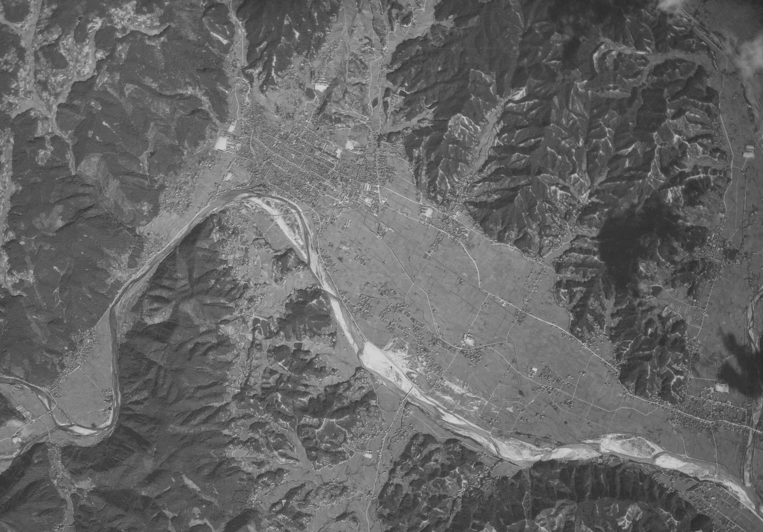 1947年の広島県府中市周辺